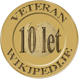 Priznanje za deset let delovanja na Wikipediji. Na Klemnovo željo izdelal matijap.